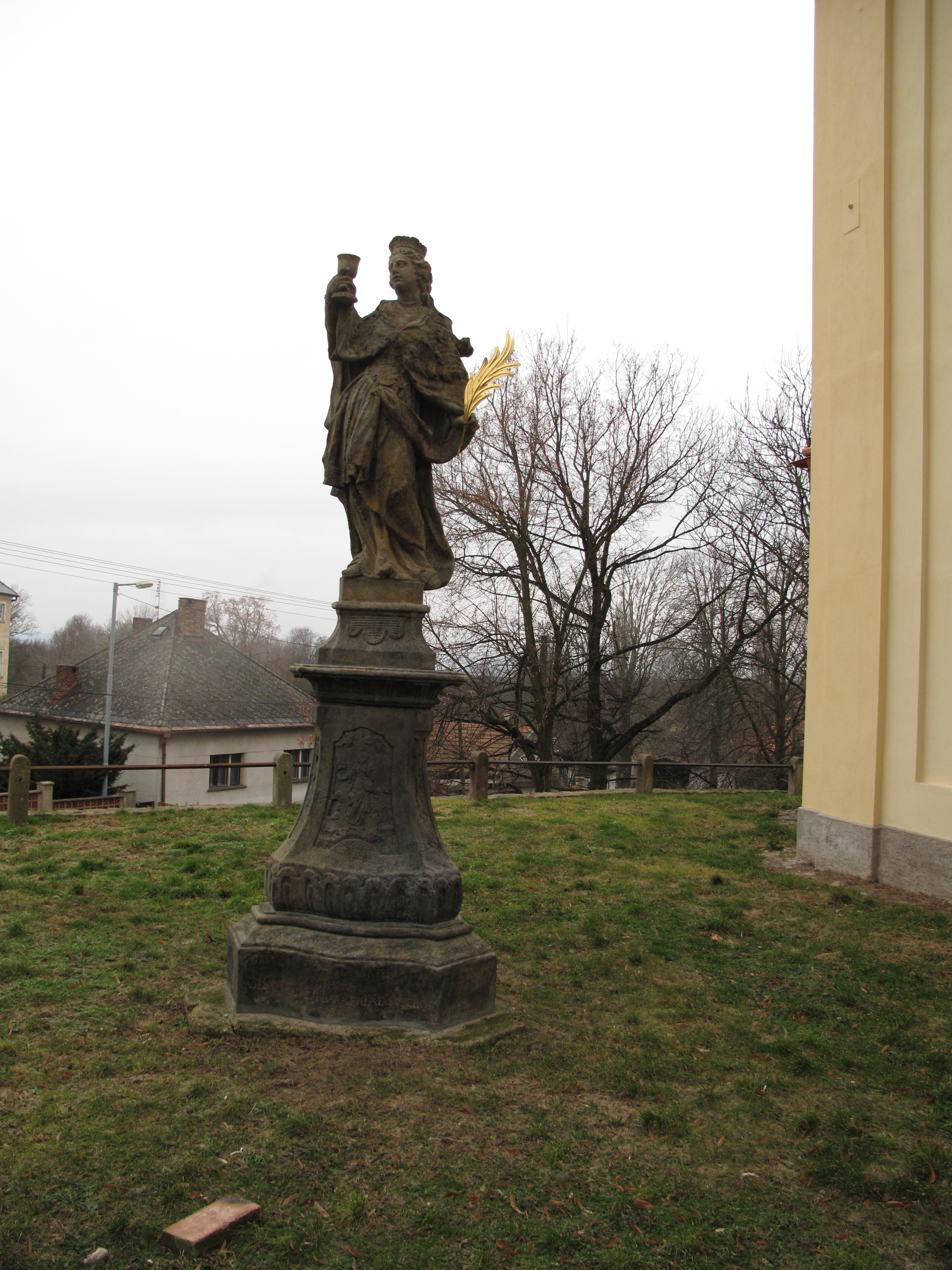 Socha v Dlažkovicích. Okres Litoměřice, Česká republika.